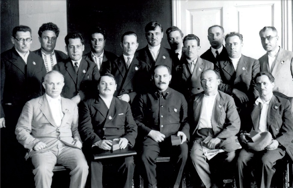 Вручение орденов ЦИК СССР руководителям республик, краев и областей. Первый ряд, слева направо: Н.С. Хрущев – I секретарь МГК ВКП(б), А.А. Жданов – первый секретарь Ленинградского обкома и горкома ВКП(б), Л.М. Каганович – первый секретарь Московского обкома ВКП(б), Л.П. Берия – первый секретарь ЦК КП(б) Грузии, Н.А. Лакоба – председатель ЦИК Абхазской АССР. Второй ряд: Н.Ф. Гикало – первый секретарь ЦК КП(б) Белоруссии, К.А. Абрамов – председатель СНК Татарской АССР, З.И. Булашев – председатель СНК Башкирской АССР, Г.П. Рахманов – председатель СНК Азербайджанской ССР, Н.М. Голодед – председатель СНК Белорусской ССР, Н.А. Филатов – председатель Мособлисполкома, Н.А. Булганин – председатель исполкома Моссовета, И.М. Варейкис – первый секретарь Сталинградского крайкома ВКП(б), Г. Мгалоблишвили – председатель СНК Грузинской ССР, М.О. Разумов – первый секретарь Восточно-Сибирского крайкома ВКП(б) и М.Дж. Багиров – первый секретарь ЦК КП(б) Азербайджана. Москва, 8 августа 1935.